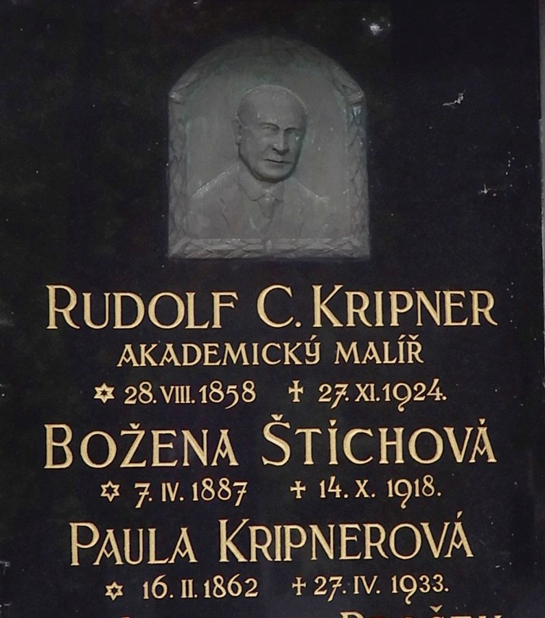 Bubenečský hřbitov, , hrob Rudolf C. Kripner